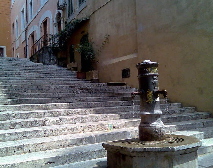 Location del film I Soliti Ignoti di Mario Monicelli. L'ingresso della carbonaia, ora nello stesso punto c'è una porta, da dove pentrano nell'abitazione per il furto.